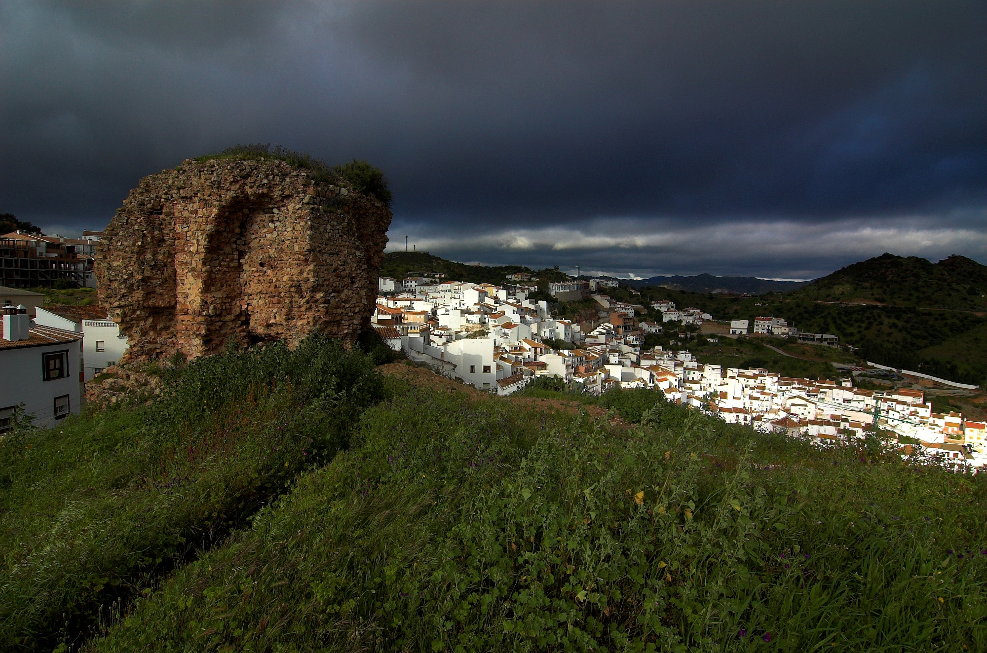 Vista del pueblo desde la zona donde se hallaba el castillo árabe, del que solo queda la Torre de la Vela.